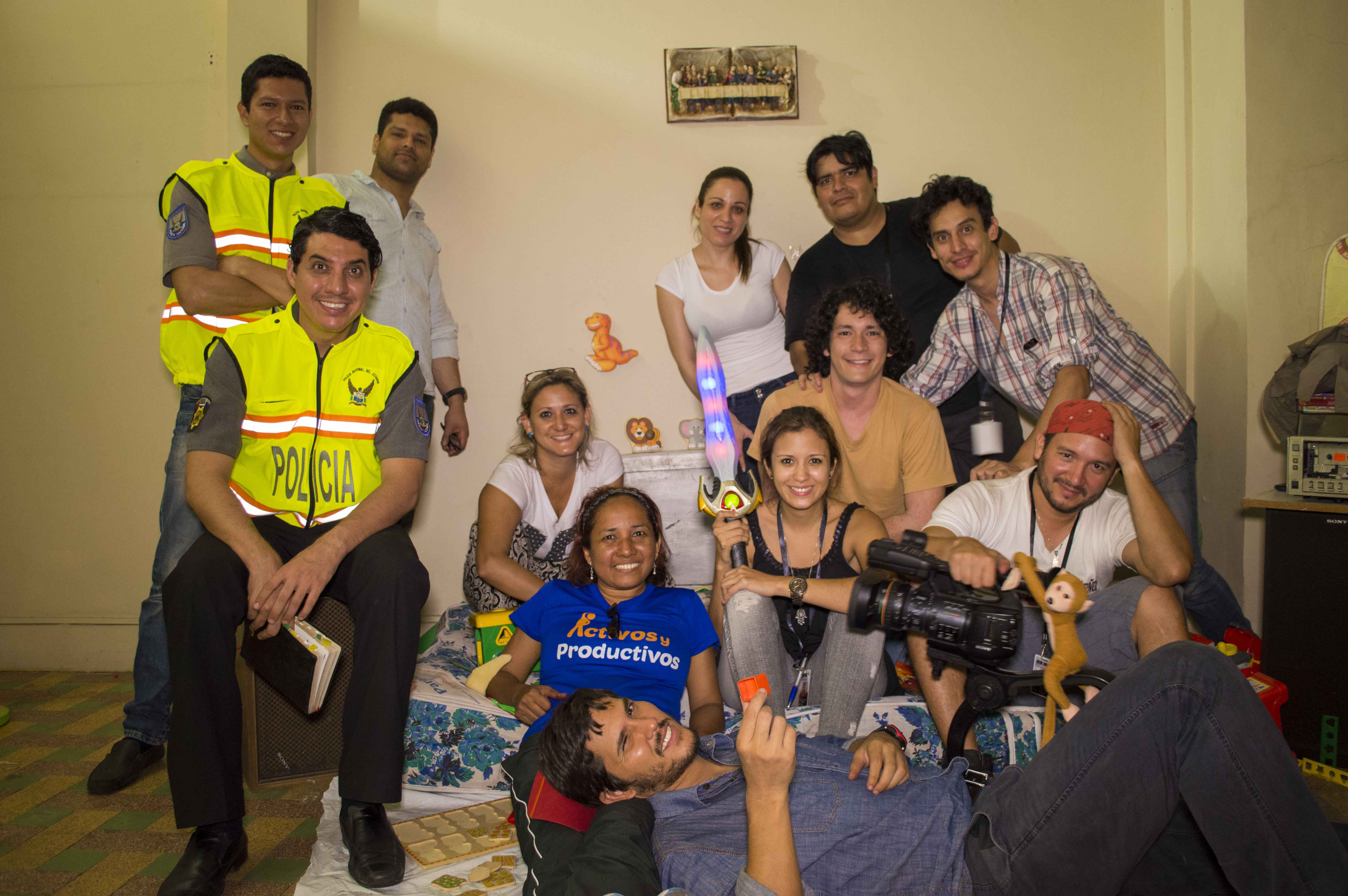 Primera semana de rodaje de la película Entre Sombras: Averno, en 2015. En la fotografía se puede apreciar parte del elenco y la producción, entre los que se encuentran Ney Calderón, Marlon Pantaleón, Carolina Asanza, Lucía Ramos, Juan Pablo Asanza, Daniela Vallejo, Cindy del Salto Vitery, Xavier Bustamante Ruiz, Felipe Crespo, Joel Campos y Fabián Rodríguez.